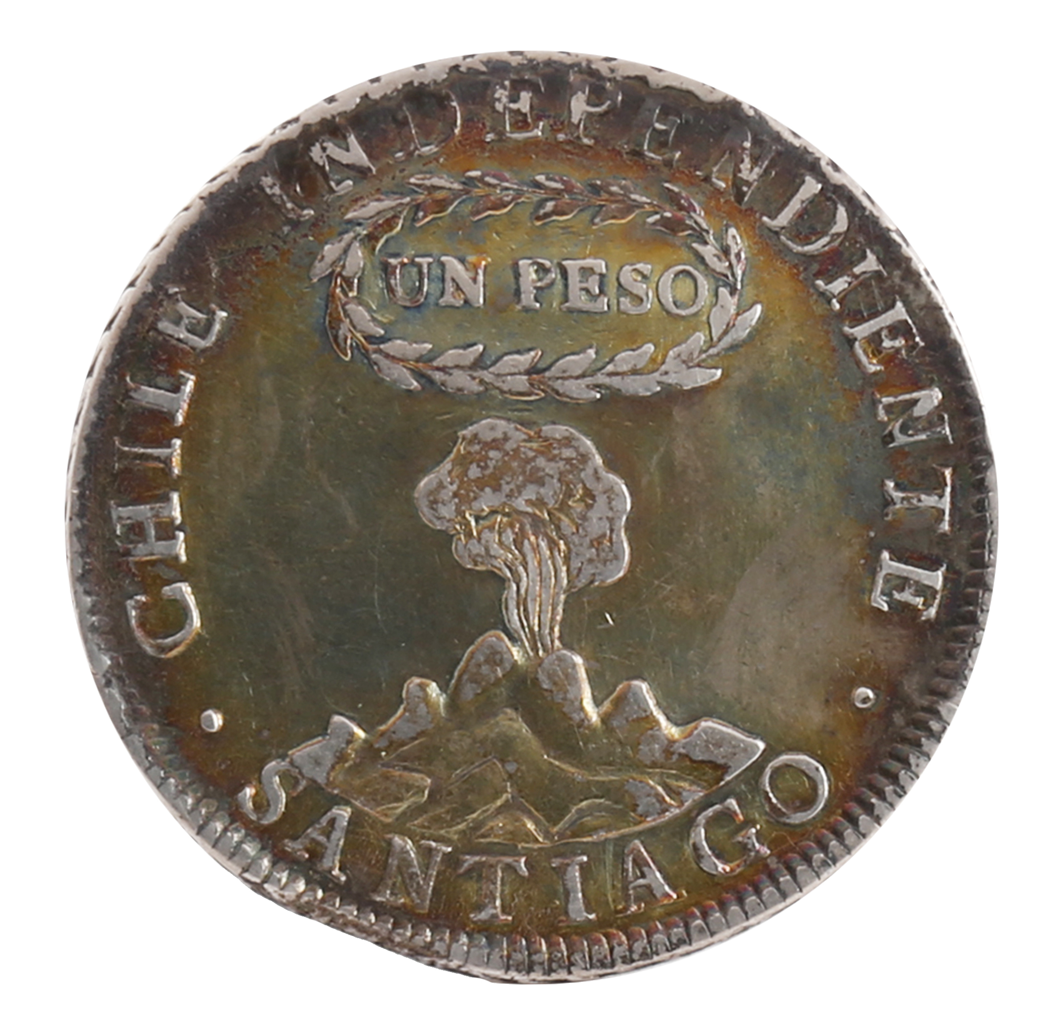 Primera moneda acuñada de Chile Independiente: 1 peso de Santiago de 1817, con imagen del volcán. Corresponde a la primera moneda de Chile independiente. Su imagen resalta los valores de la vida republicana y el deseo de reconocer, a través de los símbolos usados, una nación con identidad propia. Se pueden leer las inscripciones de Libertad, Unión, Fuerza e Independencia en representación de este “nuevo orden”.